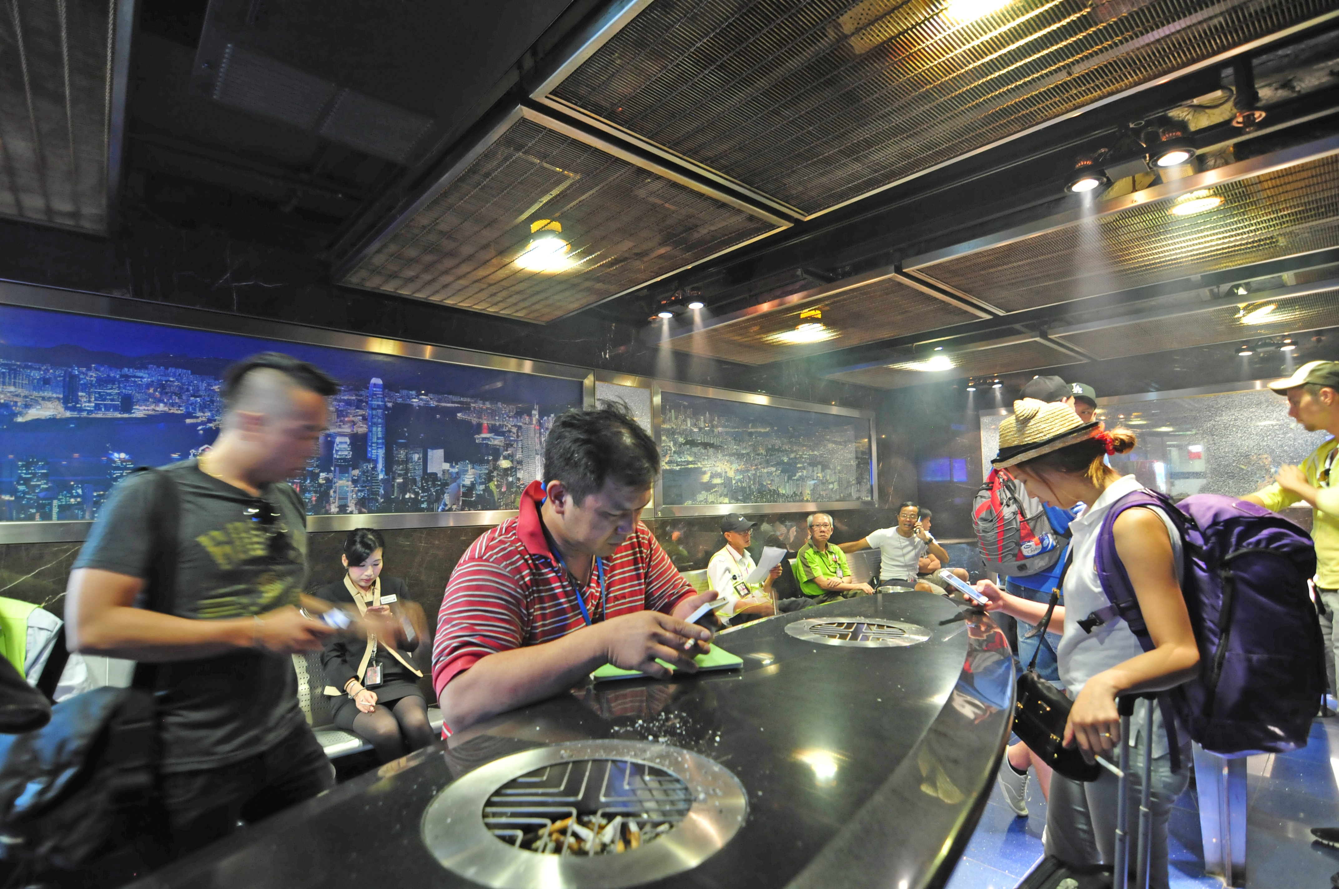 Wikimania 2013 Hongkong